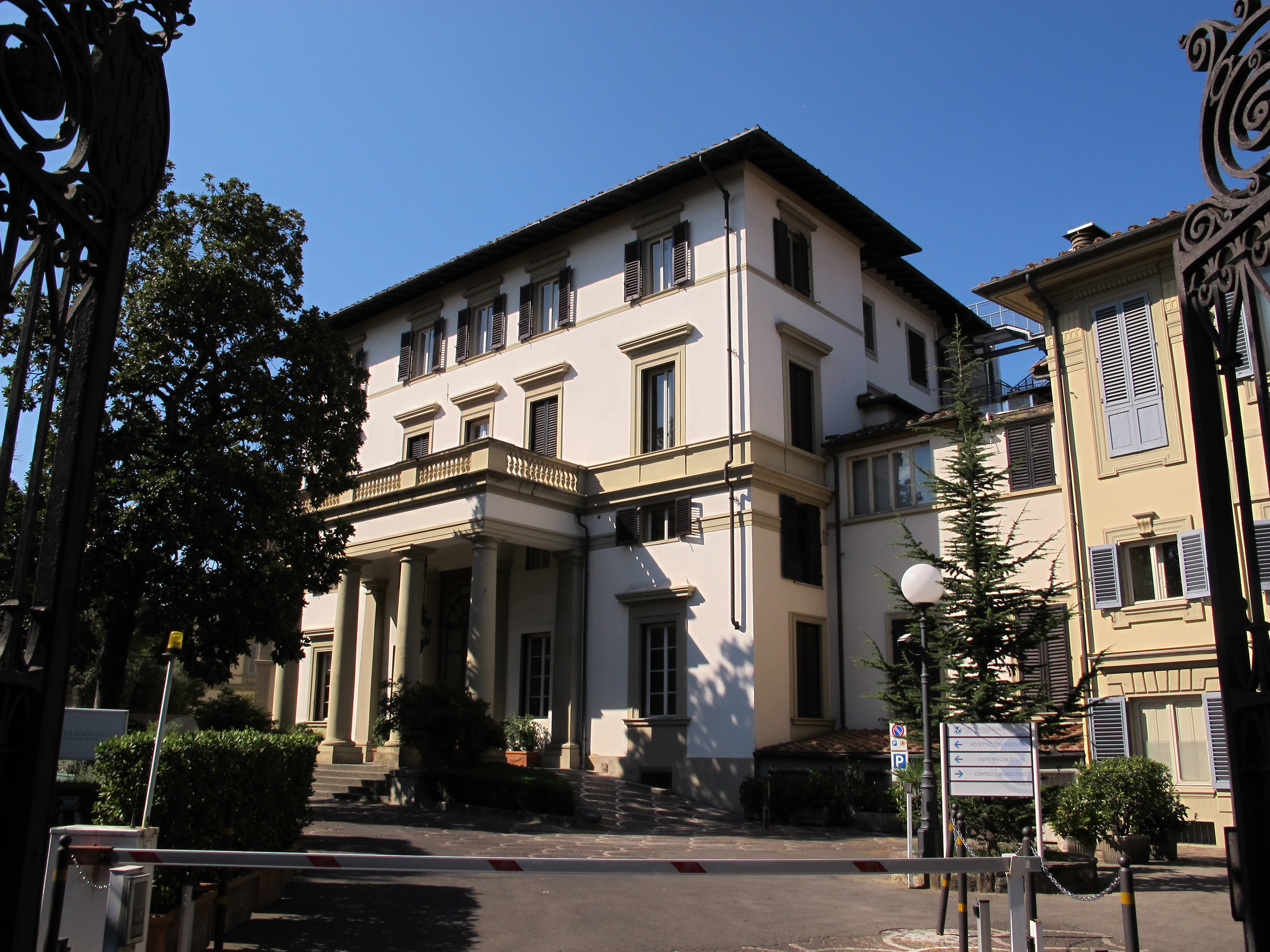 Piazzale Donatello, Firenze